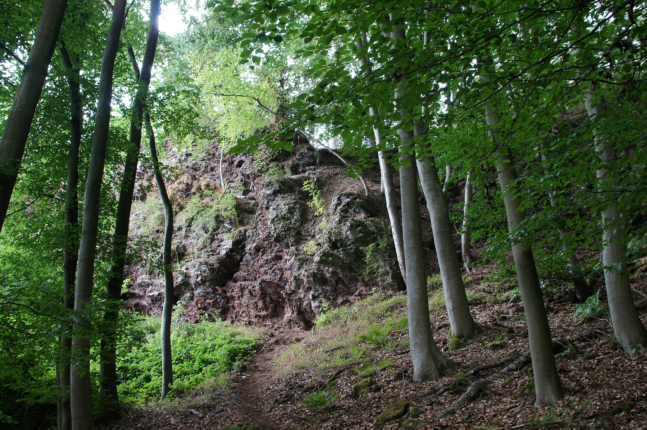 Kottenheimer Büden, Schlackenwall im Wald, darin befinden sich die "Sieben Stuben"